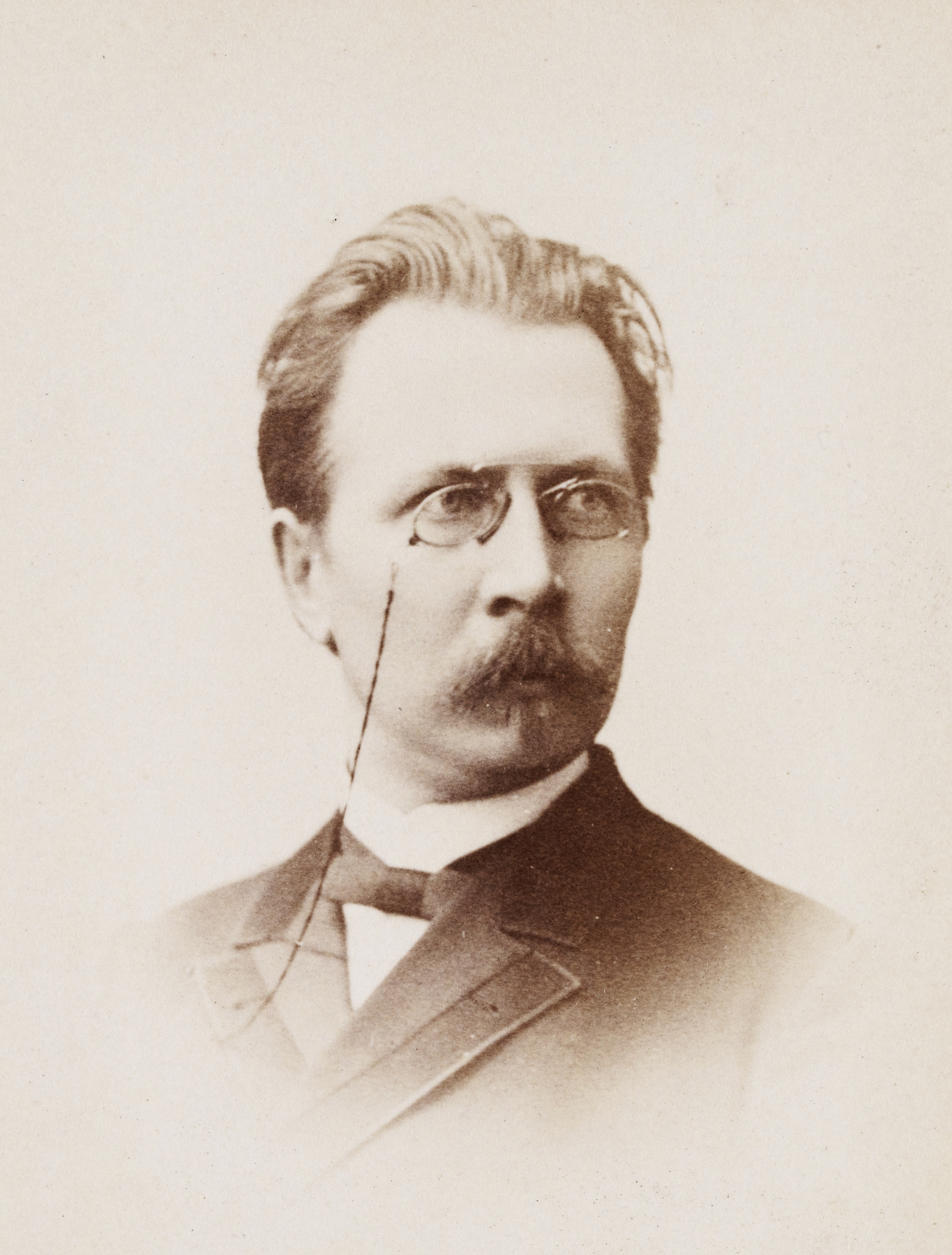 Нюстрём, Карл Густав архитектор